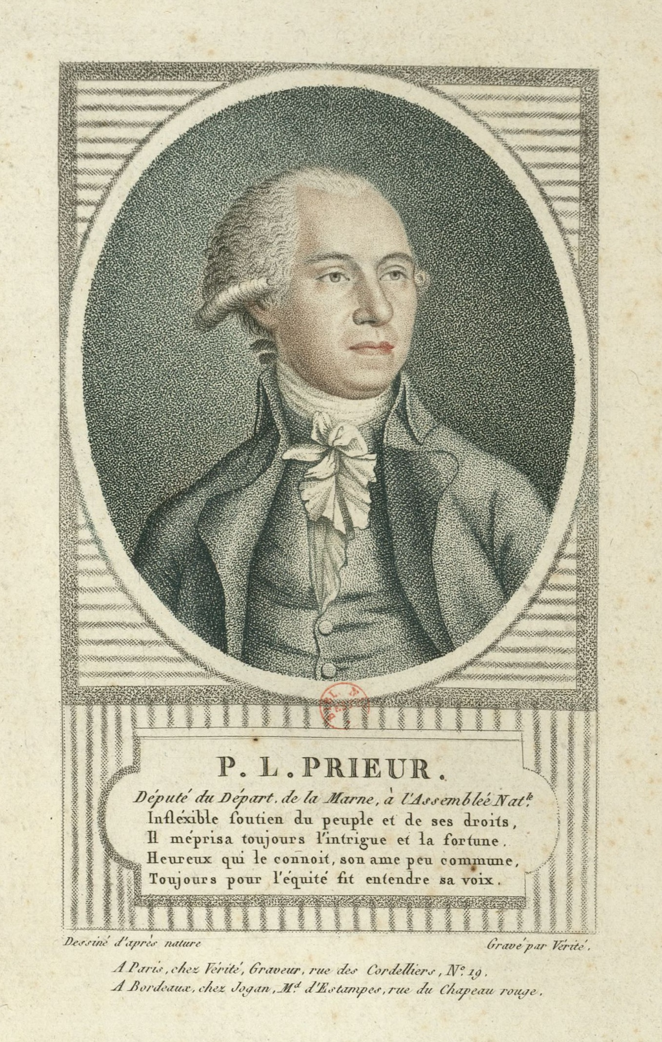 Portrait de Pierre-Louis Prieur, dit Prieur de la Marne, gravé par Jean-Baptiste Vérité.